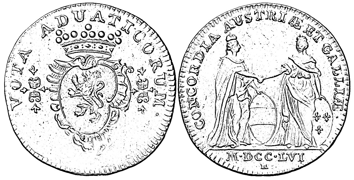 CONCORDIA AUSTRIÆ ET GALLIÆ MDCCLVI R = Roettiers VOTA ADUATICORUM Allegorien Frankreichs und Österreichs reichen sich die Hände ca. 32-33mm